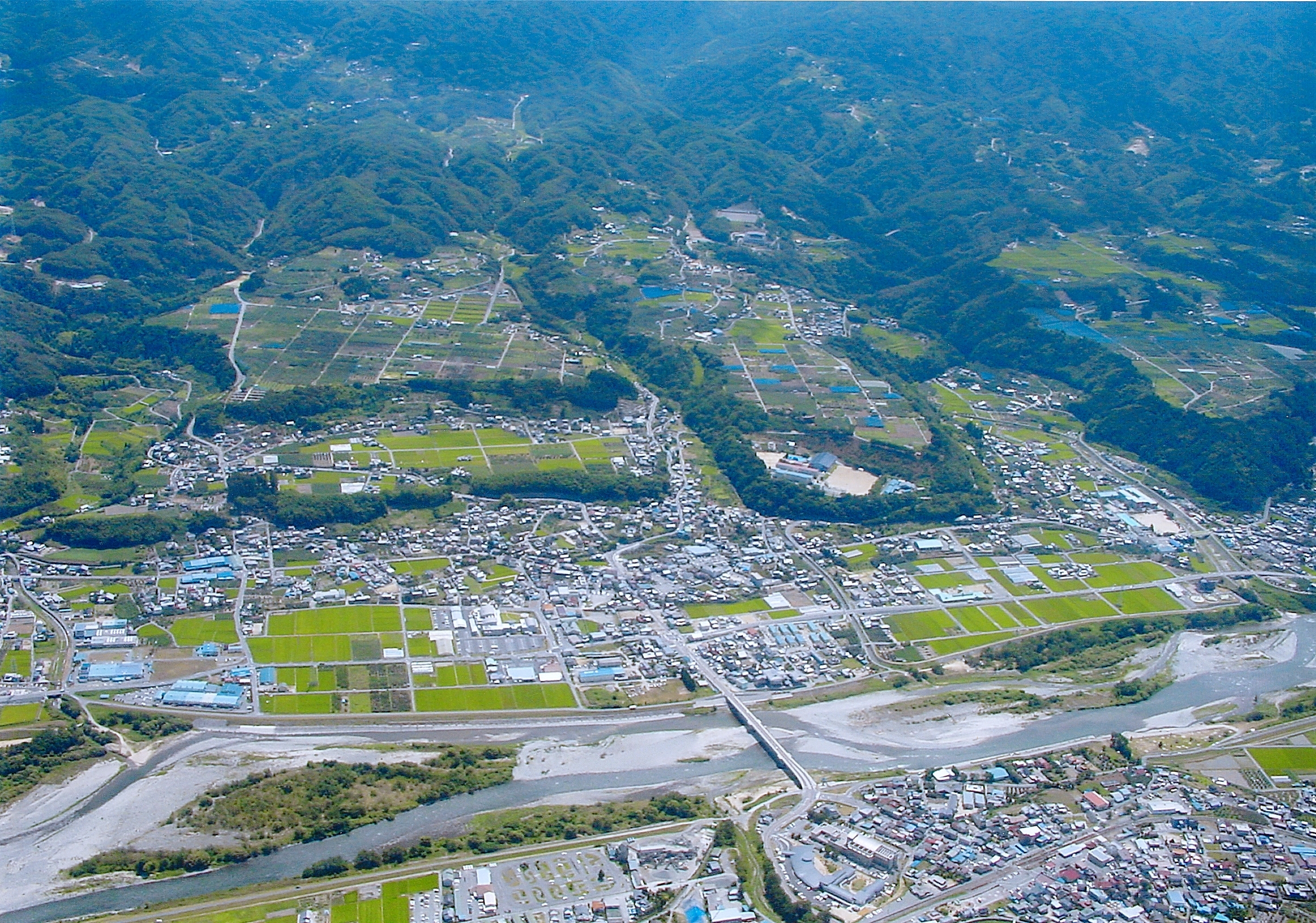 上空から中心部を望む